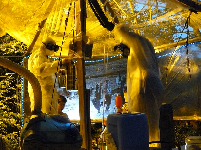 Une scène de théâtre installation performance, l'objet est le partenaire de jeu, un concurrent de l'acteur (Cryogène, Avignon-2008)